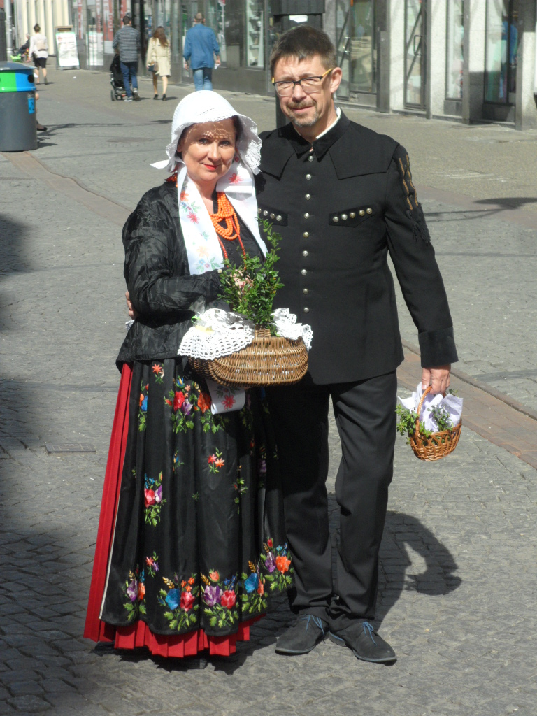 Ślązaczka ubrana w regionalny strój rozbarski z górnikiem. Ślůnski: Ślonzaczka we rozbarskim uobleczyńu i ślonski grubiorz. Schläsch: Schläsingerin und Bargmoan